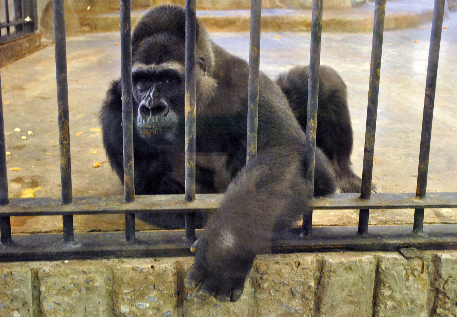 Bua Noi